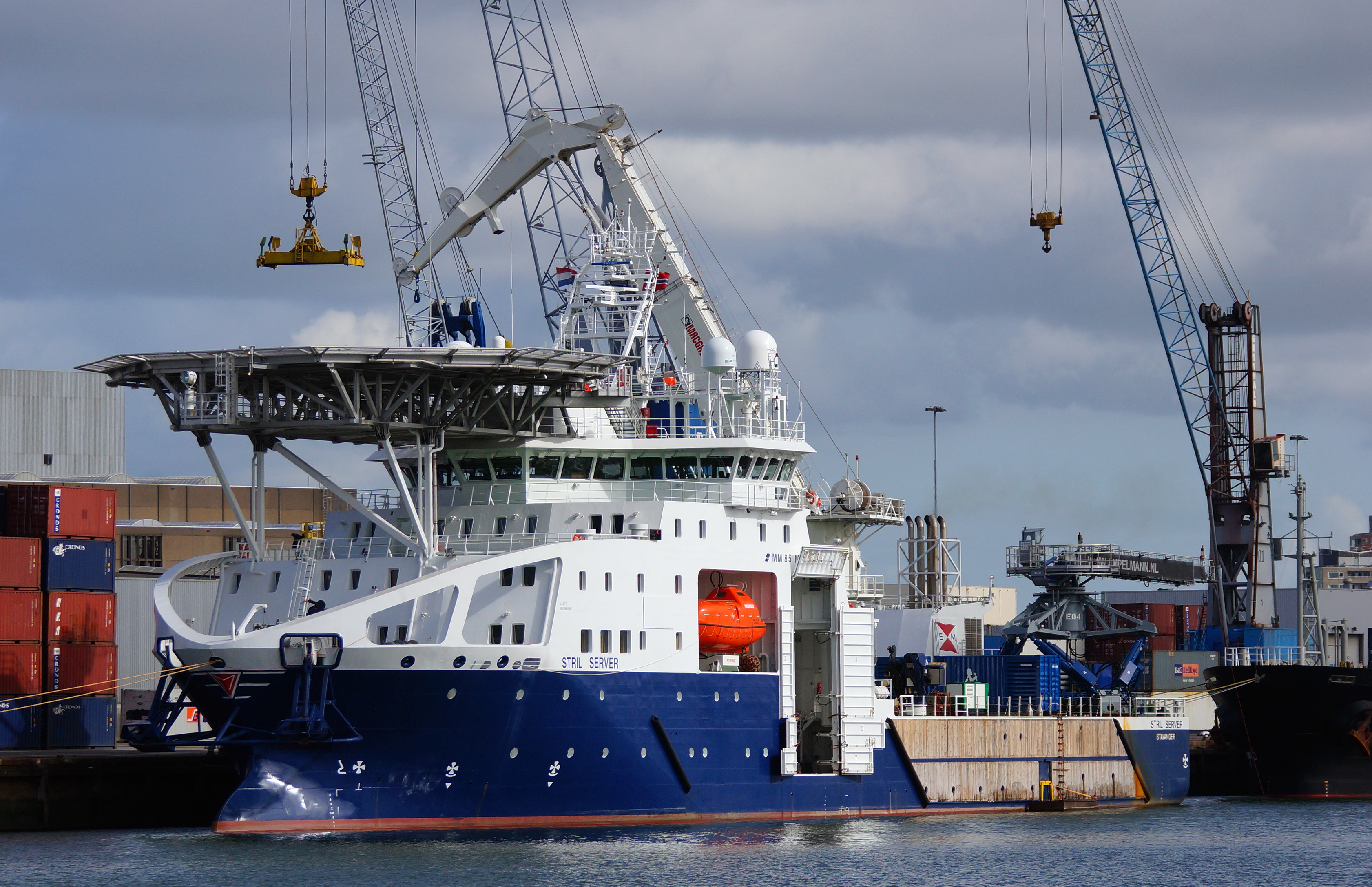 Waalhaven Rotterdam 21-9-2014